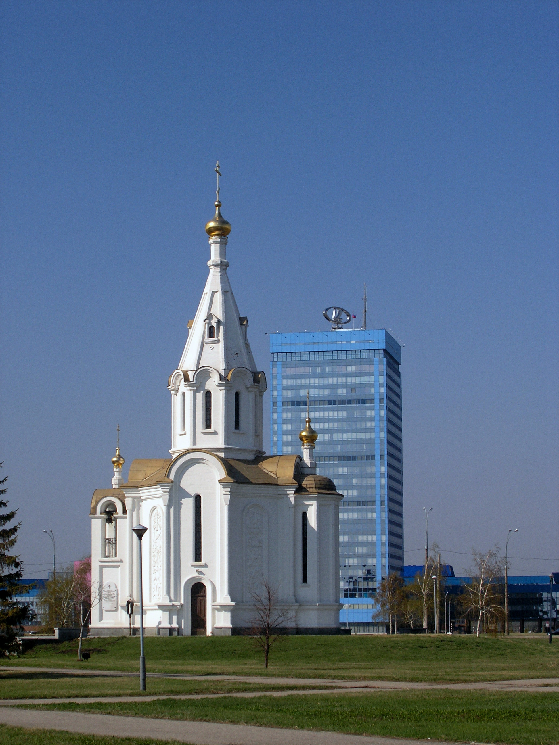 Часовня во имя Святого Архистратига Божьего Михаила — православная часовня в городе Тольятти.